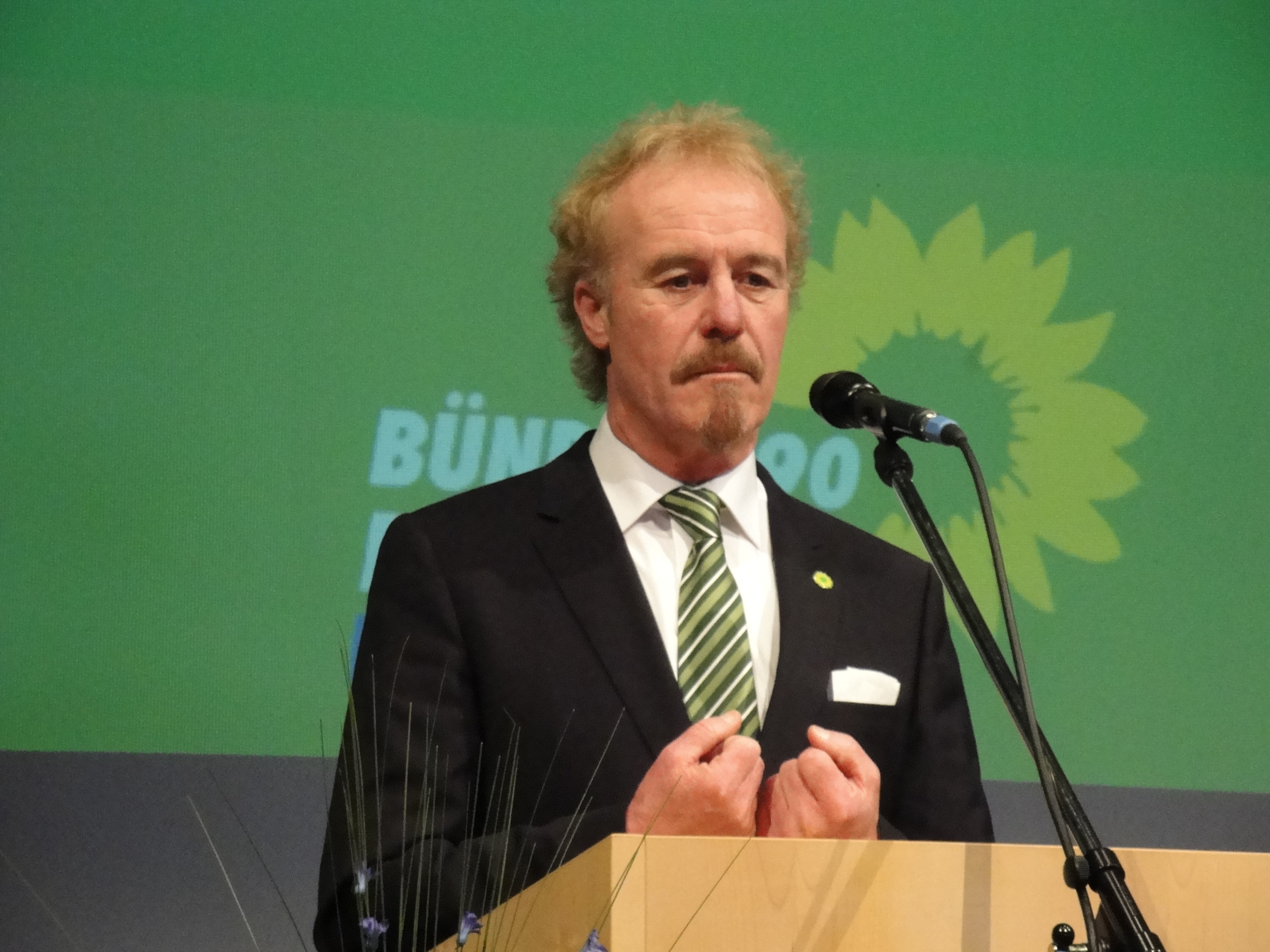 Eugen Schlachter kritisiert die Finanzpolitik von schwarz-gelb